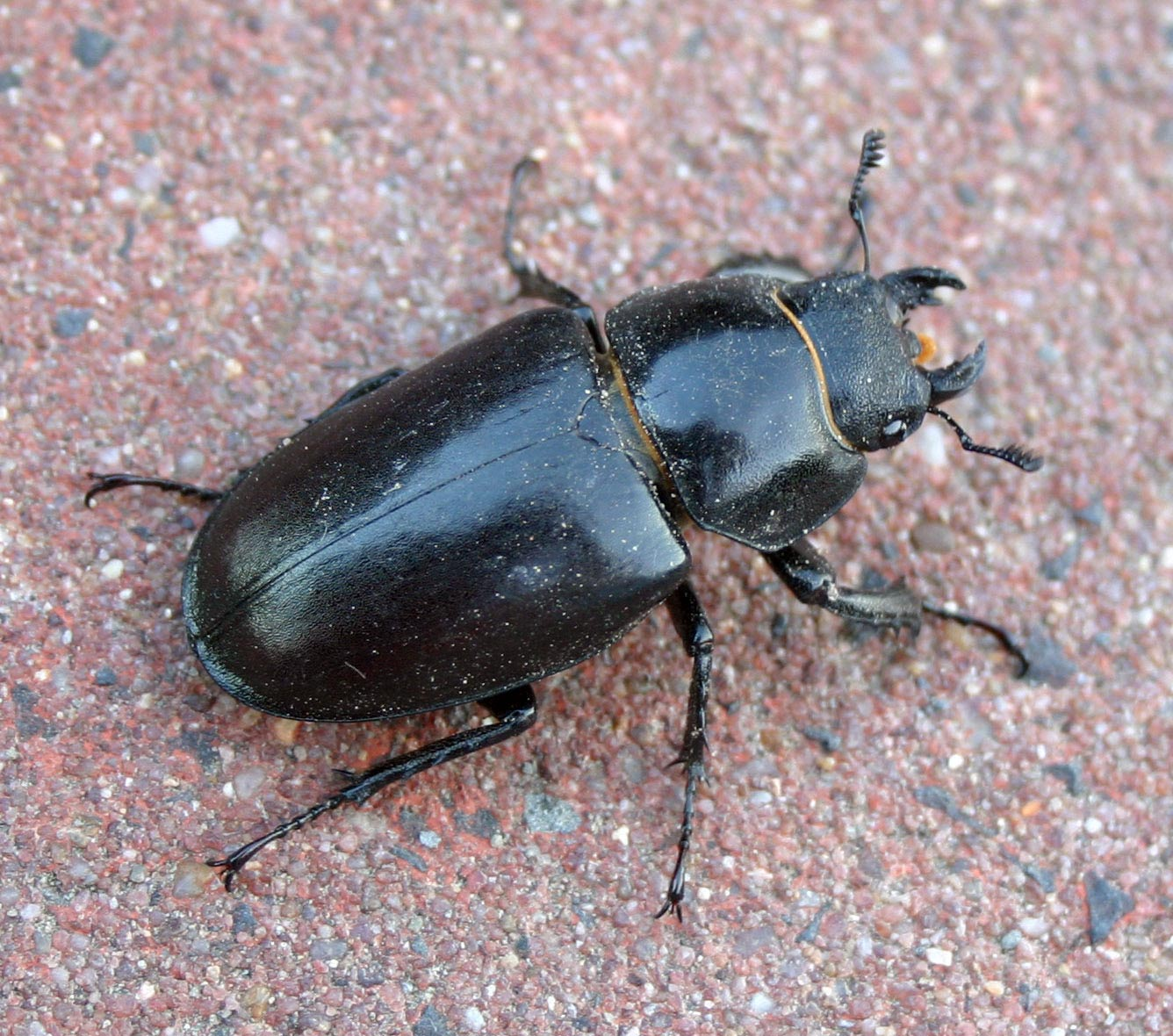 Lucanus cervus femininum